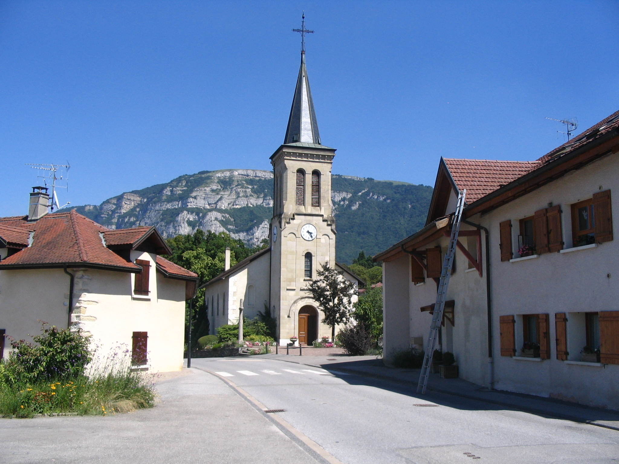 Archamps (Haute Savoie) au pied du mont Salève. Église Saint-Maurice d'Archamps